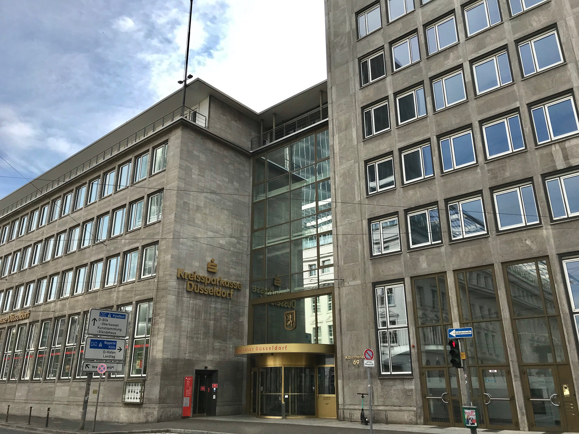 Kasernenstraße 69, Düsseldorf